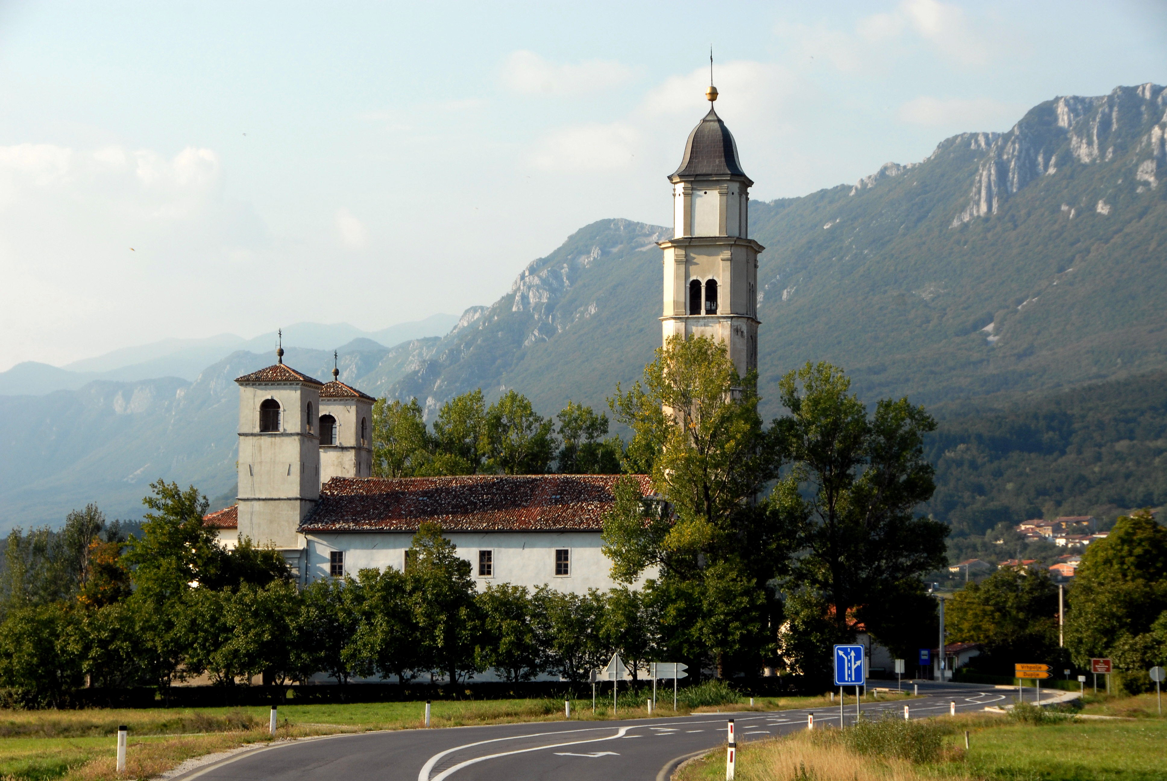 Pilgrimage church Maria Trost at Log near Vipava, Goriska, Slovenia